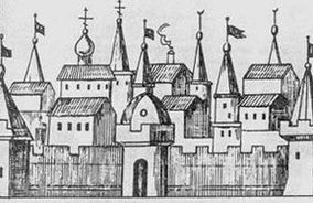 Baturyn. Russian lubok.